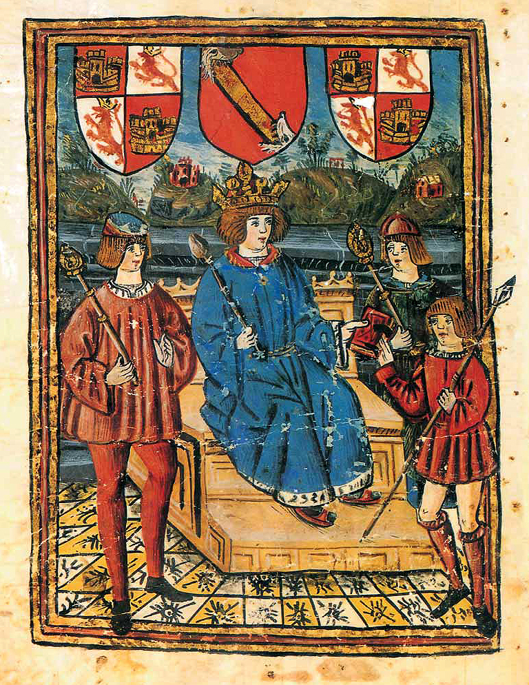 Title page of the "Z" manuscript of the "Book of All Kingdoms" (Libro del conosçimiento de todos los regnos, a work originally from 14th-century Spain), now in the Bavarian state library as "Cod.hisp. 150". Used on the title page of the 1999 edition by Lacarra. «Libro del Conosçimiento de todos los Regnos et Tierras et Señorios que son por el Mundo, et de las señales et armas que han» Edición facsimilar, transcripción, estudio y notas del Manuscrito Z de la Bayerische Staatsbibliothek, de Munich [Cod. Hisp. 150] procedente de la «Alacena de Zurita», realizada por Maria Jesús Lacarra, Maria del Carmen Lacarra Ducay y Alberto Montaner. Zaragoza, 1999.